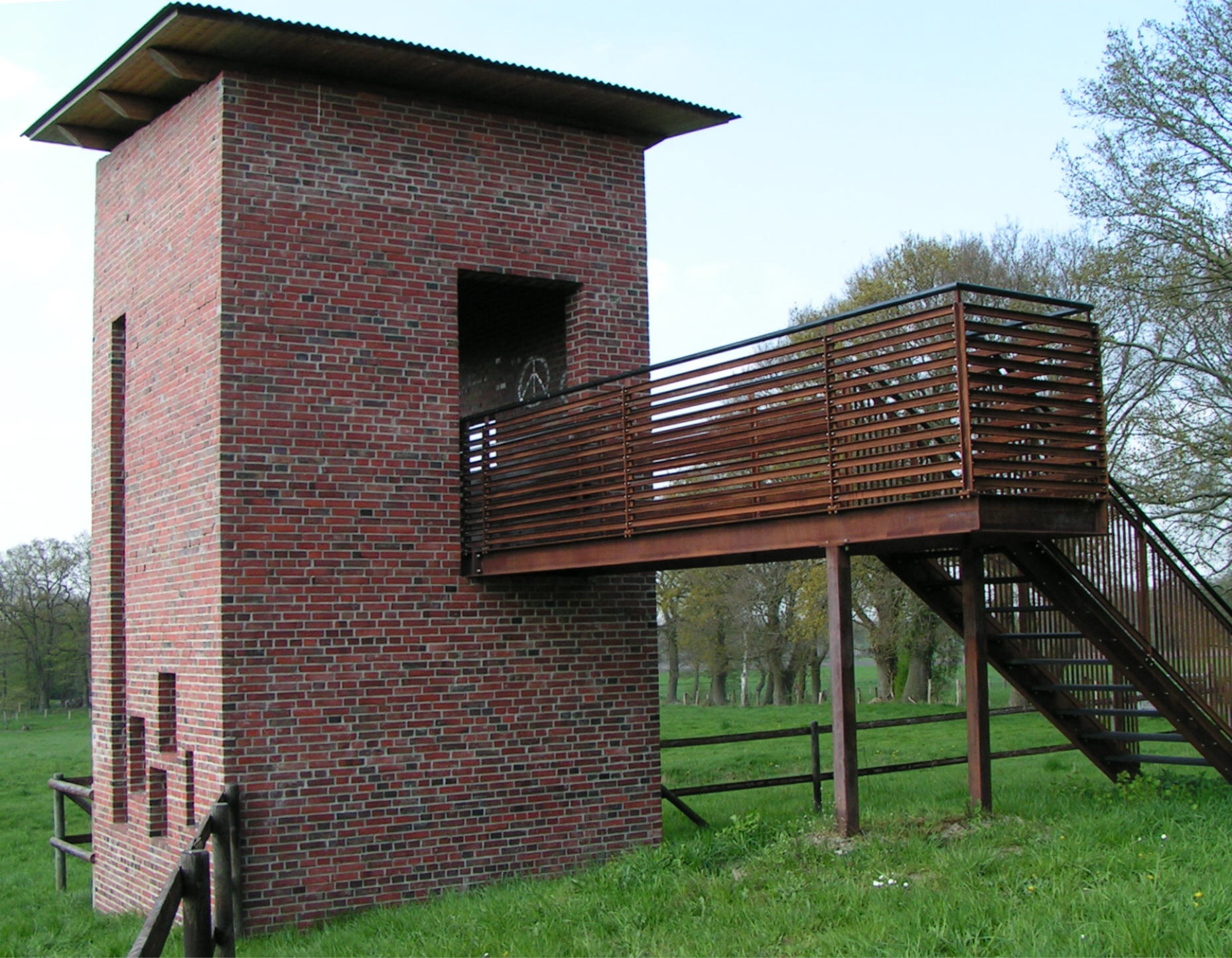 Landschaftsfenster Hankhausen (Rastede)